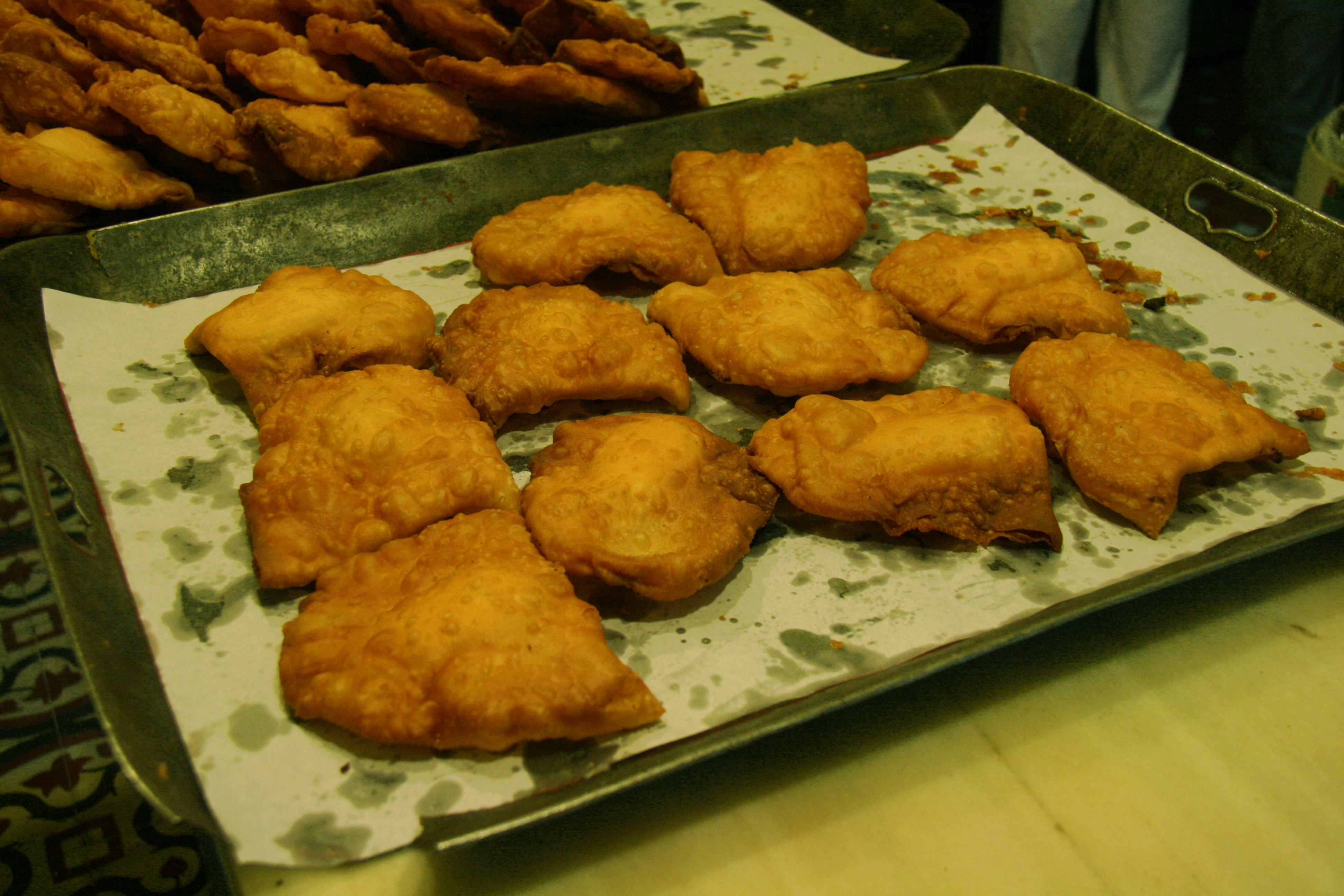 Bartolillos; süßes Gebäck, typisch für Madrid. Dreieckige Formpasteten mit gebratenem Teig oder mit einer sehr feinen Gebäckcreme gefüllt.